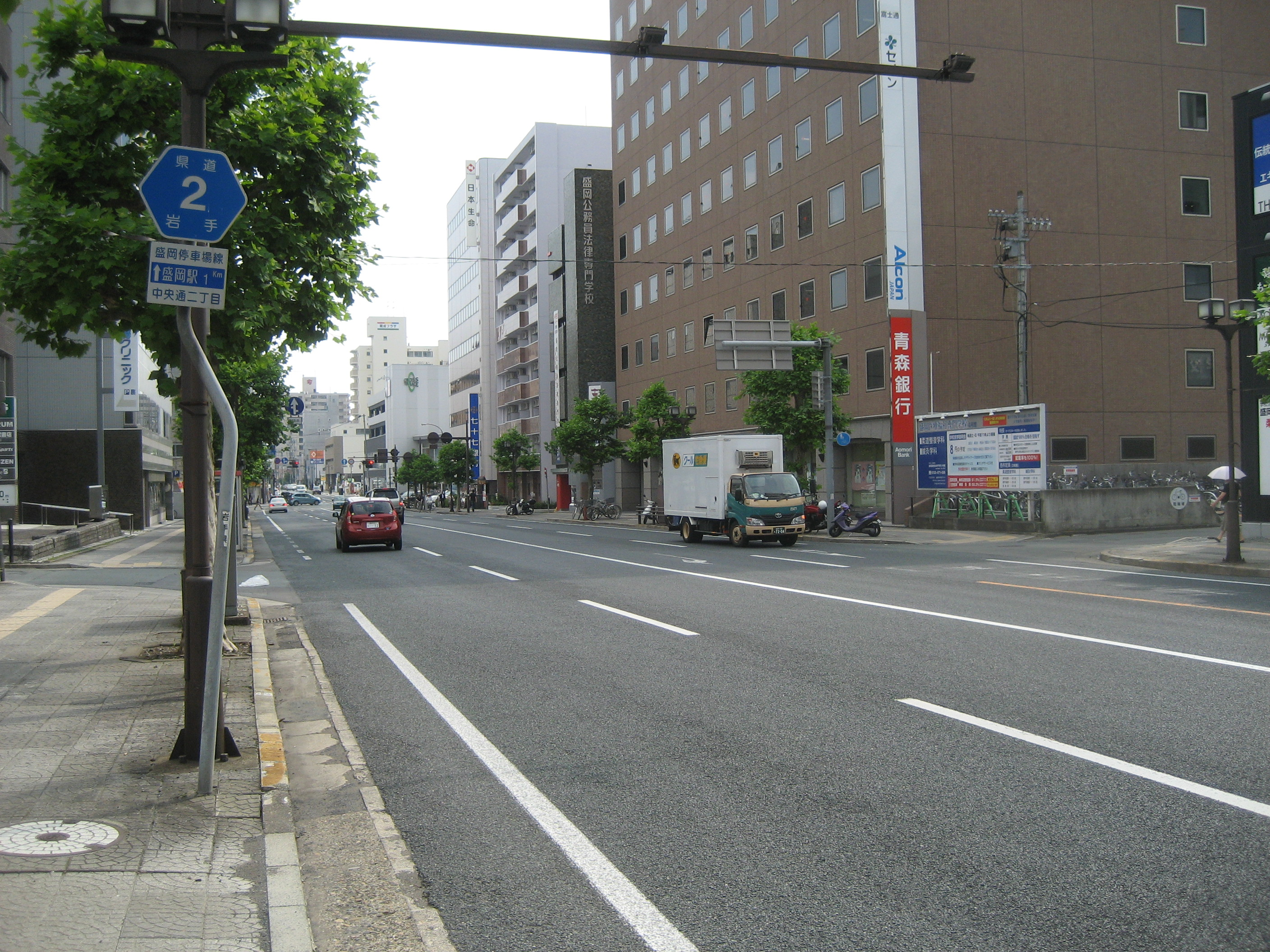 岩手県道2号線盛岡市中央通2丁目付近